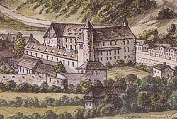 Welfenschloss (Hann. Münden)